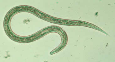 Freilebende Larve des Hakenwurmes Ancylostoma duodenale